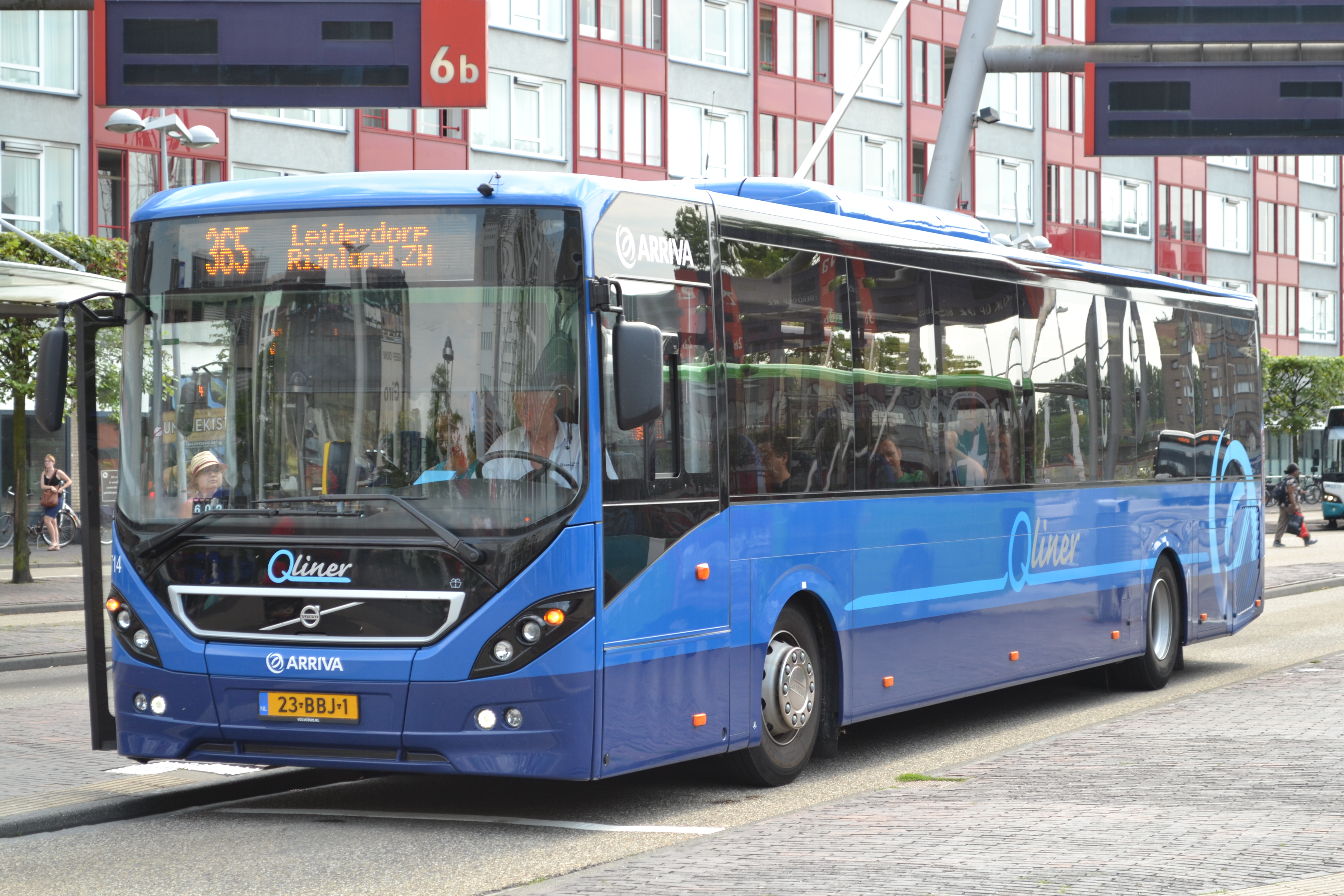 Arriva 7714, een Volvo 8900, als Qliner 365 naar het Rijnland Ziekenhuis in Leiderdorp, op het busstation van Leiden Centraal.